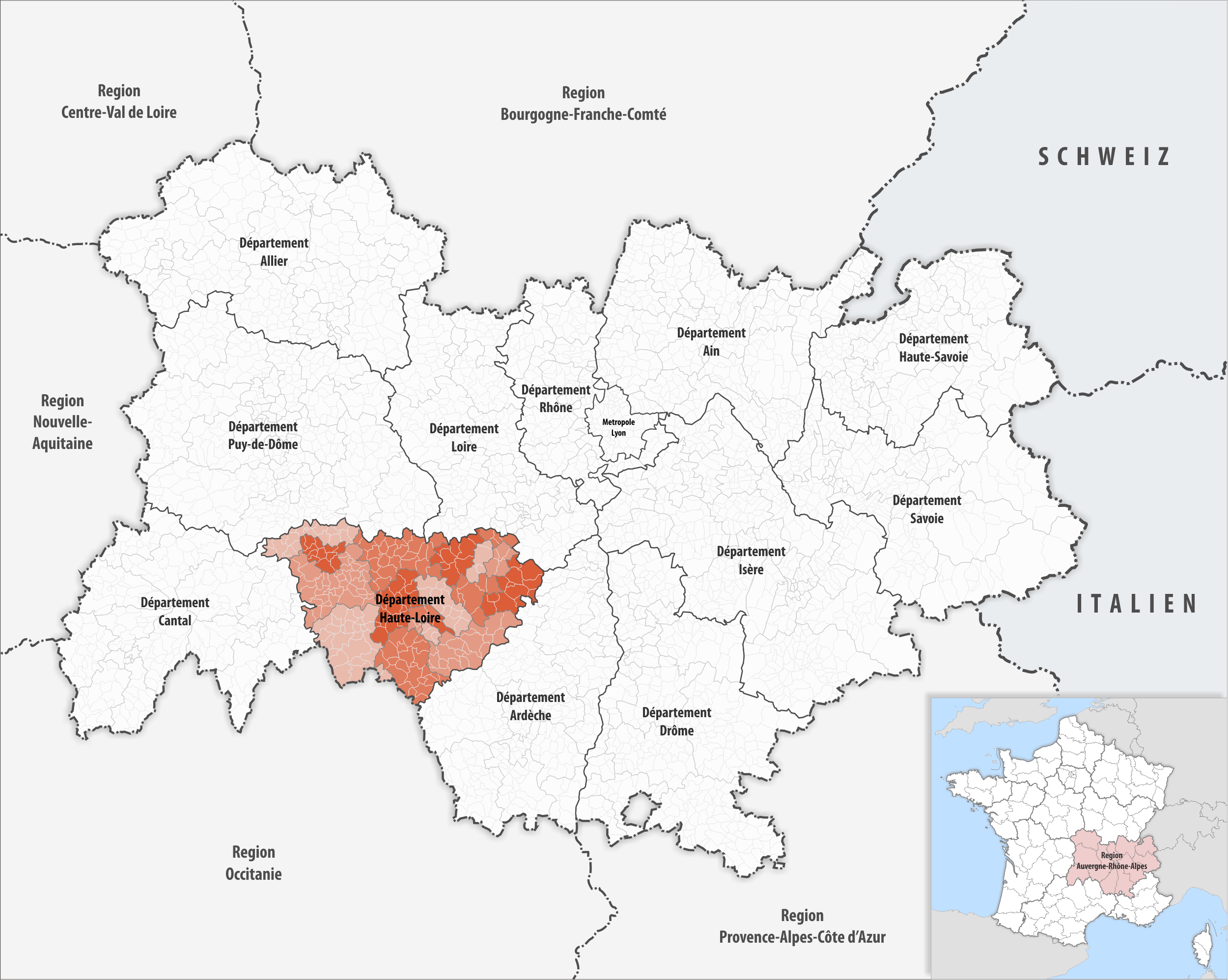 Lage des Departements Haute-Loire